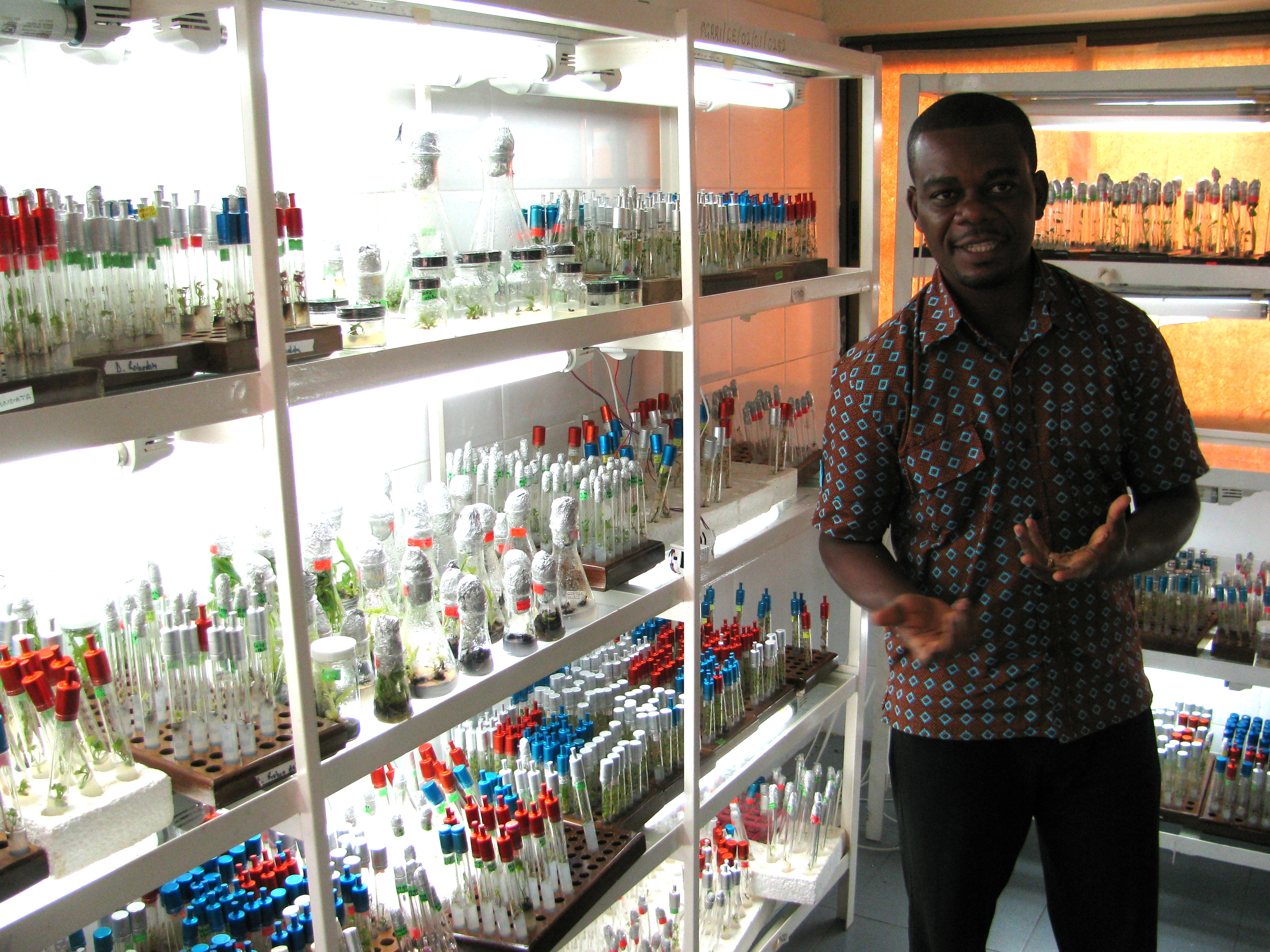 Ghana genebank, Bunso